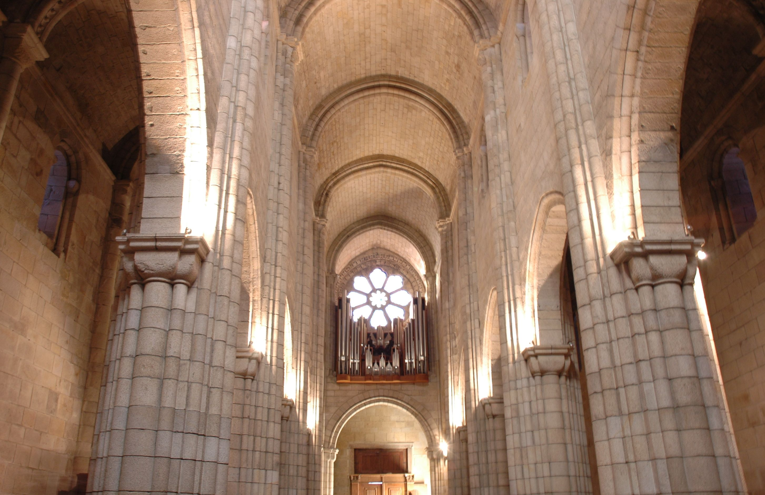 Porto - Catedral - Interior